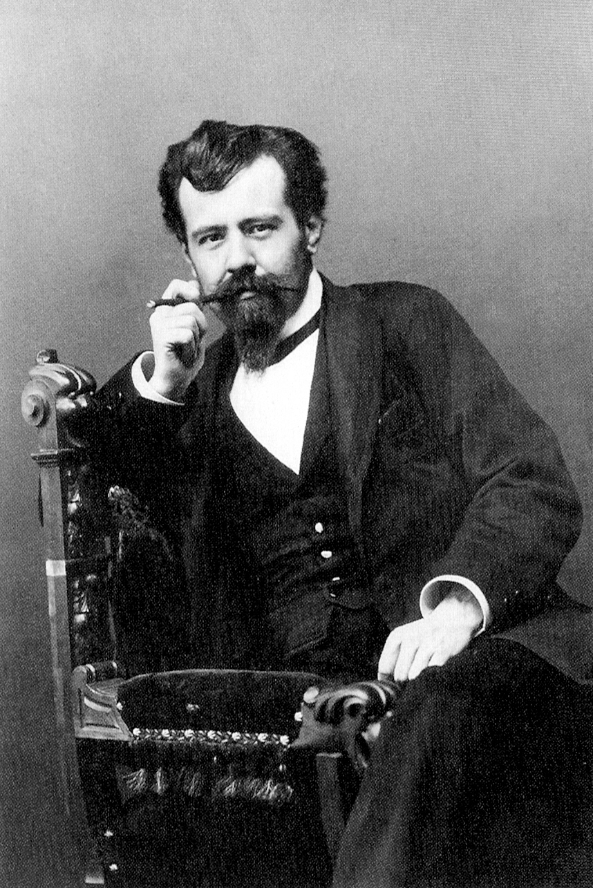 Hermann Bahr im Februar 1891